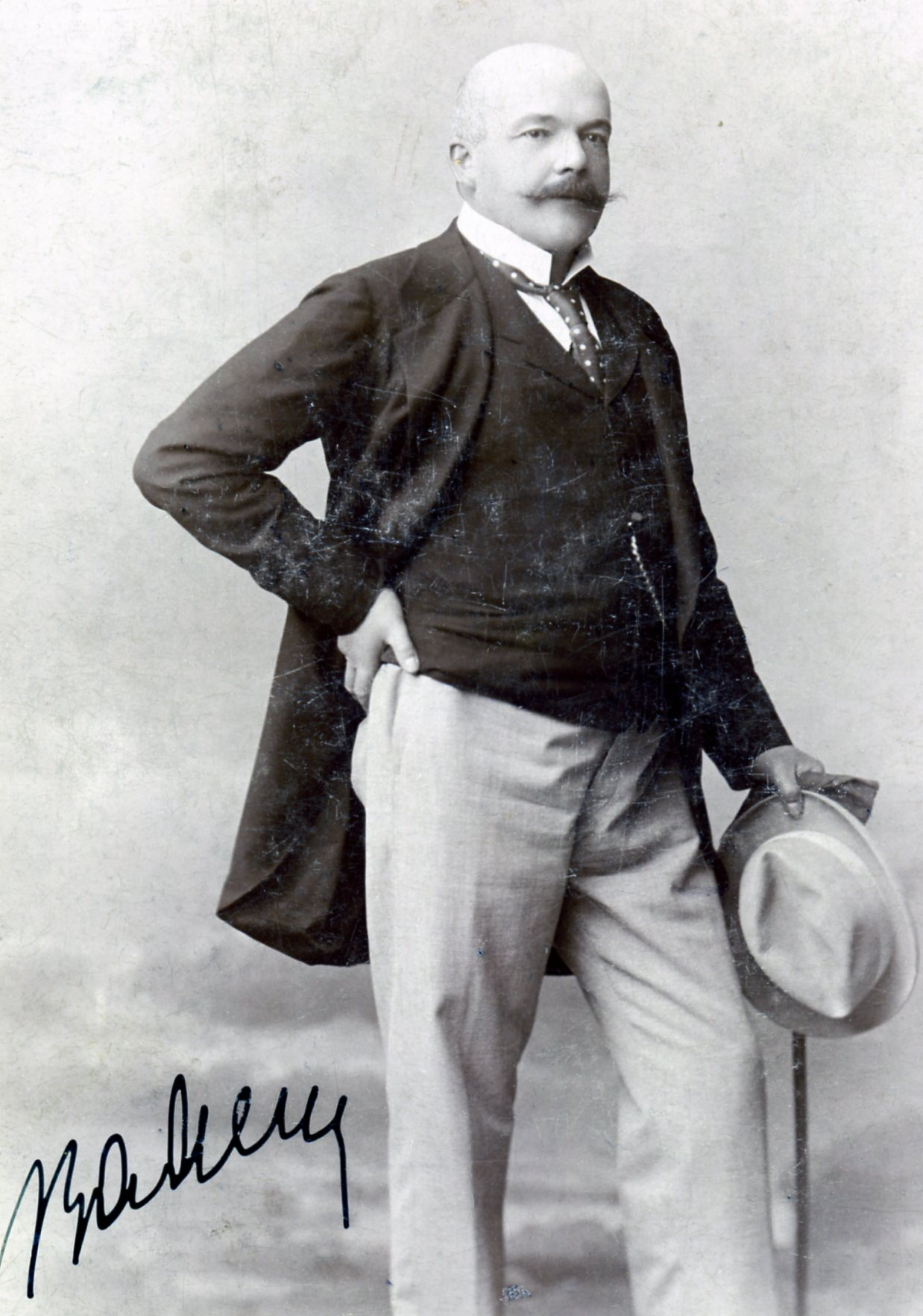 Kazimierz hr Badeni